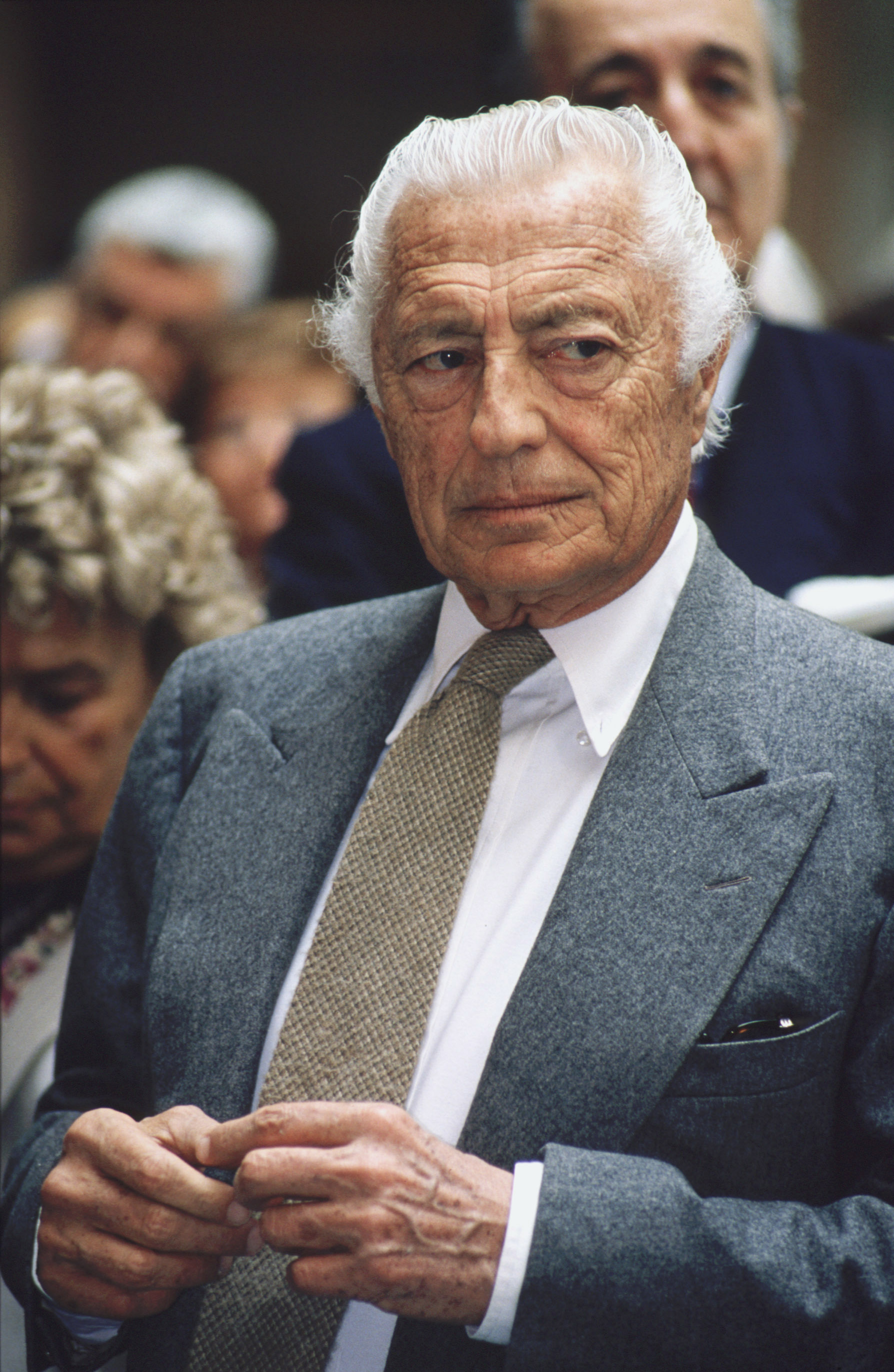 L'avvocato Gianni Agnelli